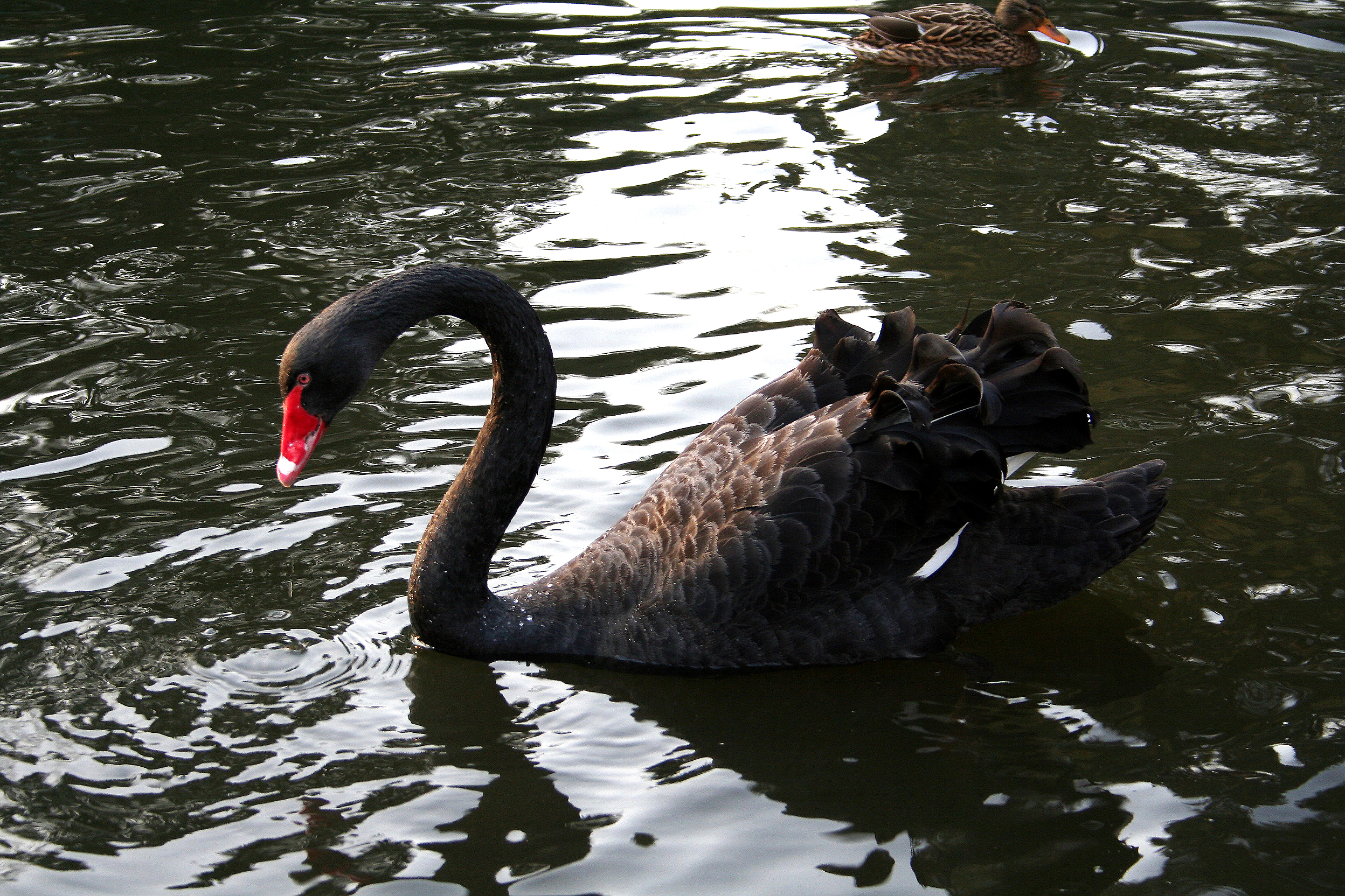 Cygnus atratus (la), Trauwerschwan (de), Black Swan (en), Cygne noir (fr), Zwarte zwaan (nl), Nwâr Cîgne (wa)